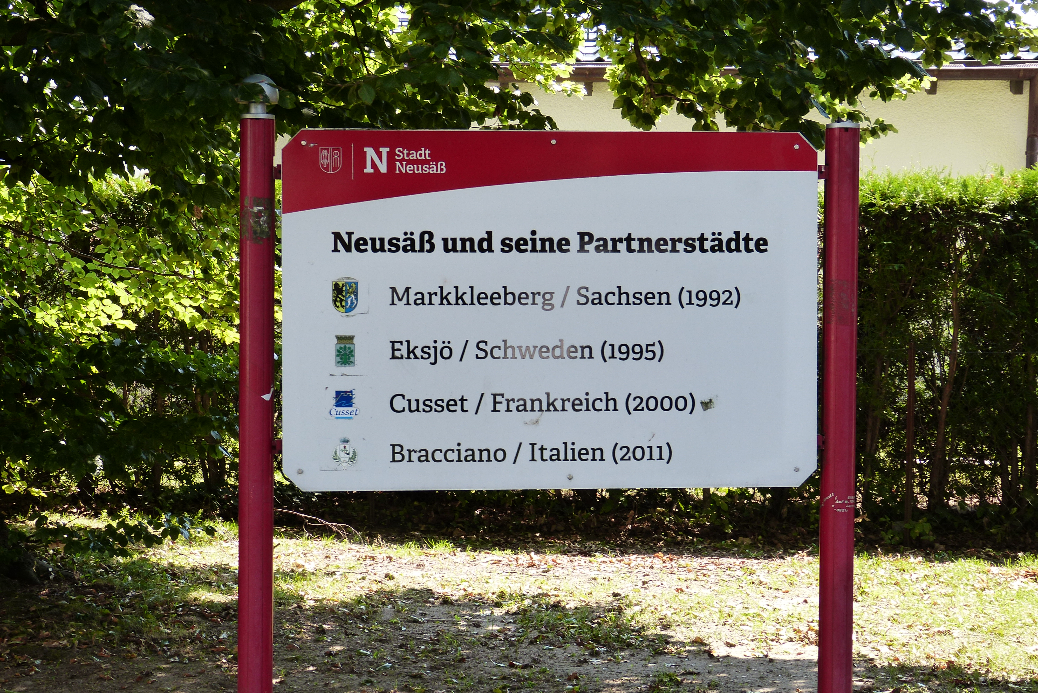 Tafel mit den Partnerstädten von Neusäß im Ägidiuspark